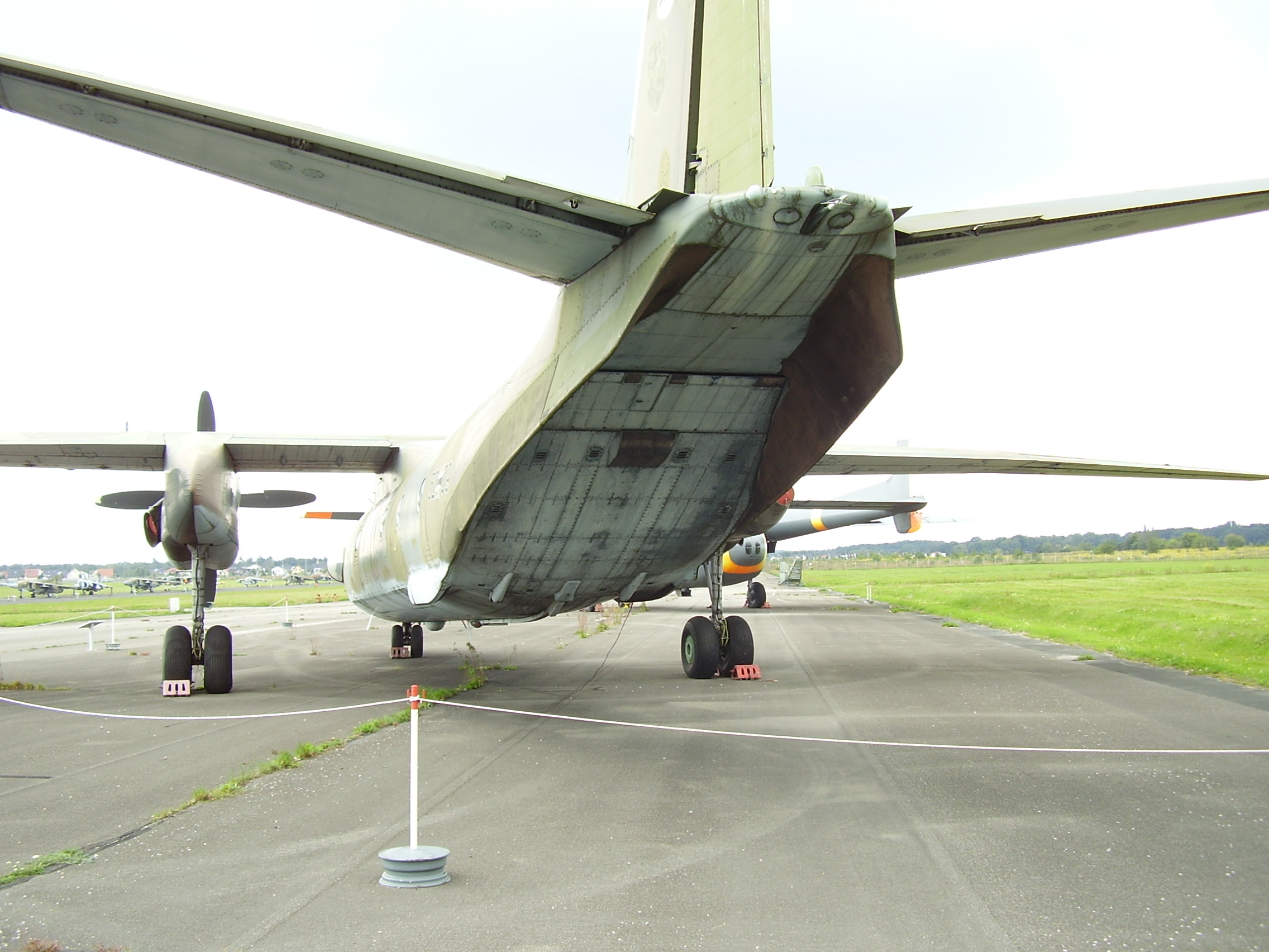 Luftwaffenmuseum der Bundeswehr; Airforce Museum of the Bundeswehr; Berlin-Gatow